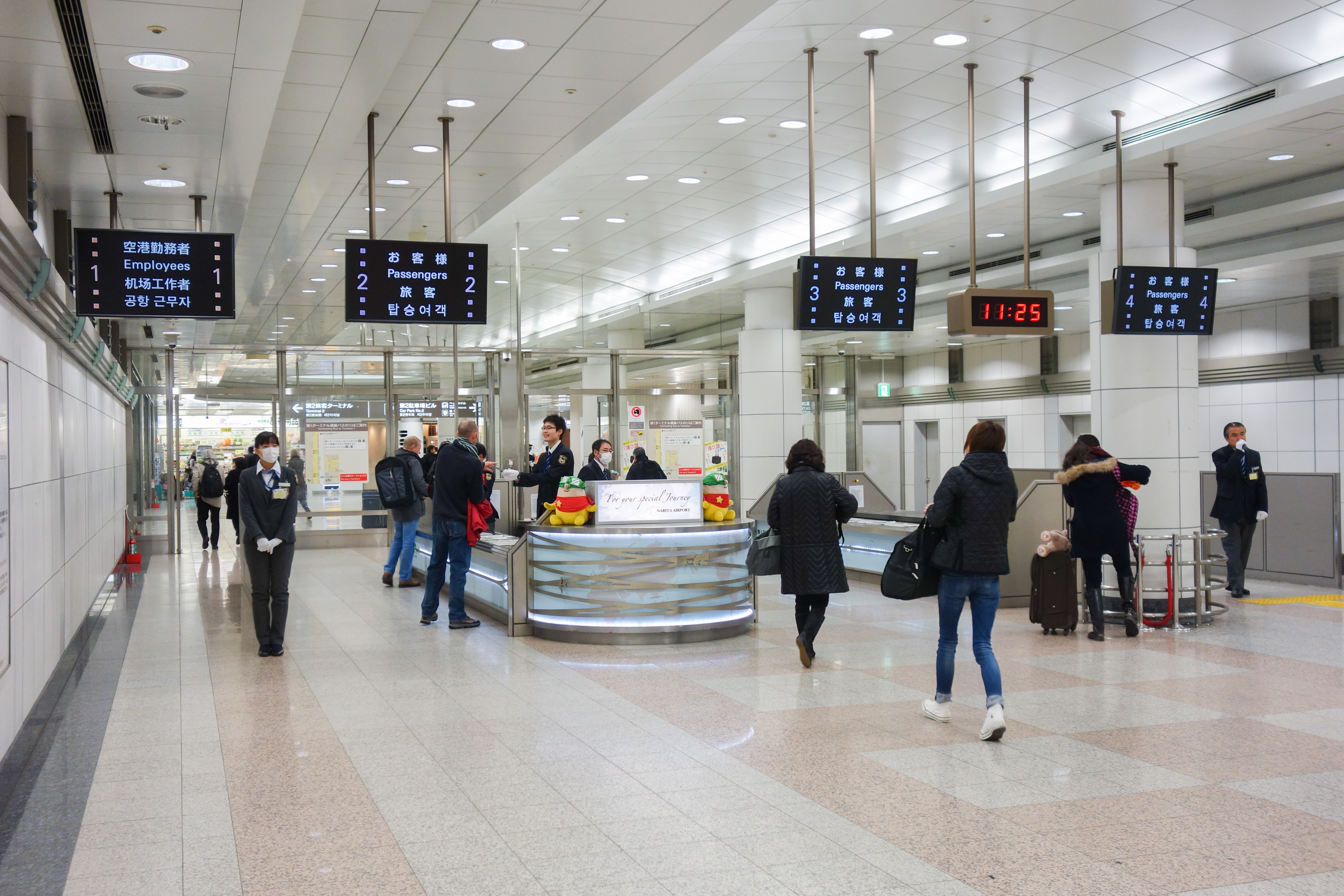 成田空港 駅出口での検問 （空港第2ビル駅から第2ターミナル方面）